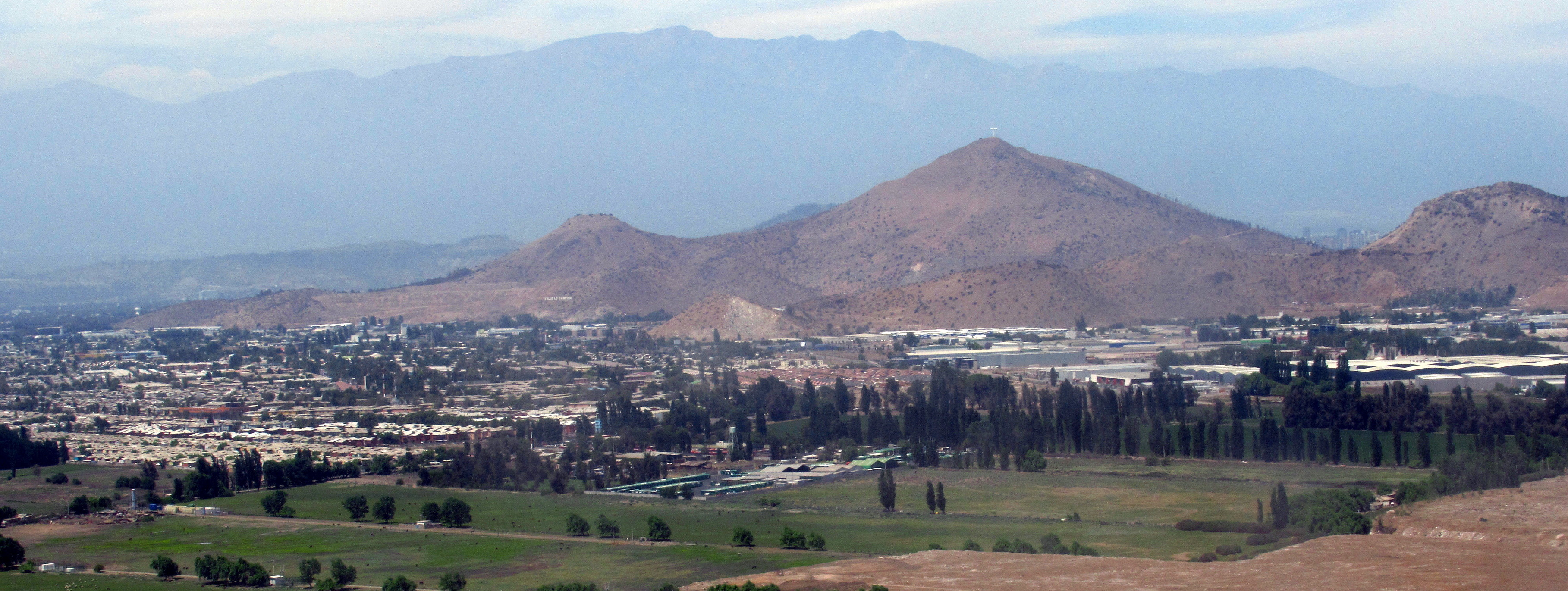 Ladera norte del Cerro Renca, su cima (905 m s.n.m.) a una distancia de 8,2 km y la comuna de Quilicura a sus pies. Altitud de vuelo 600 m s.n.m. aproximadamente.